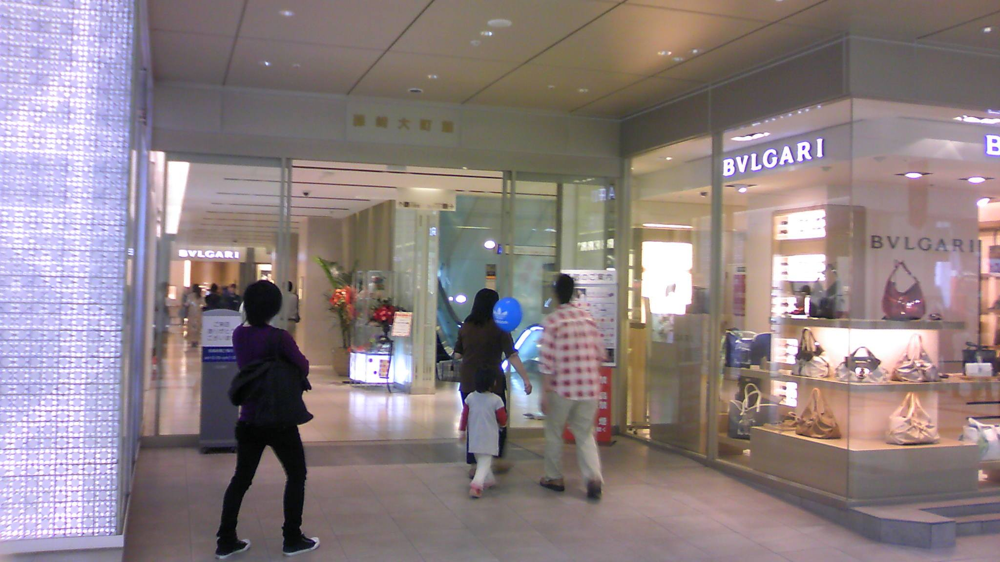 藤崎大町館入口